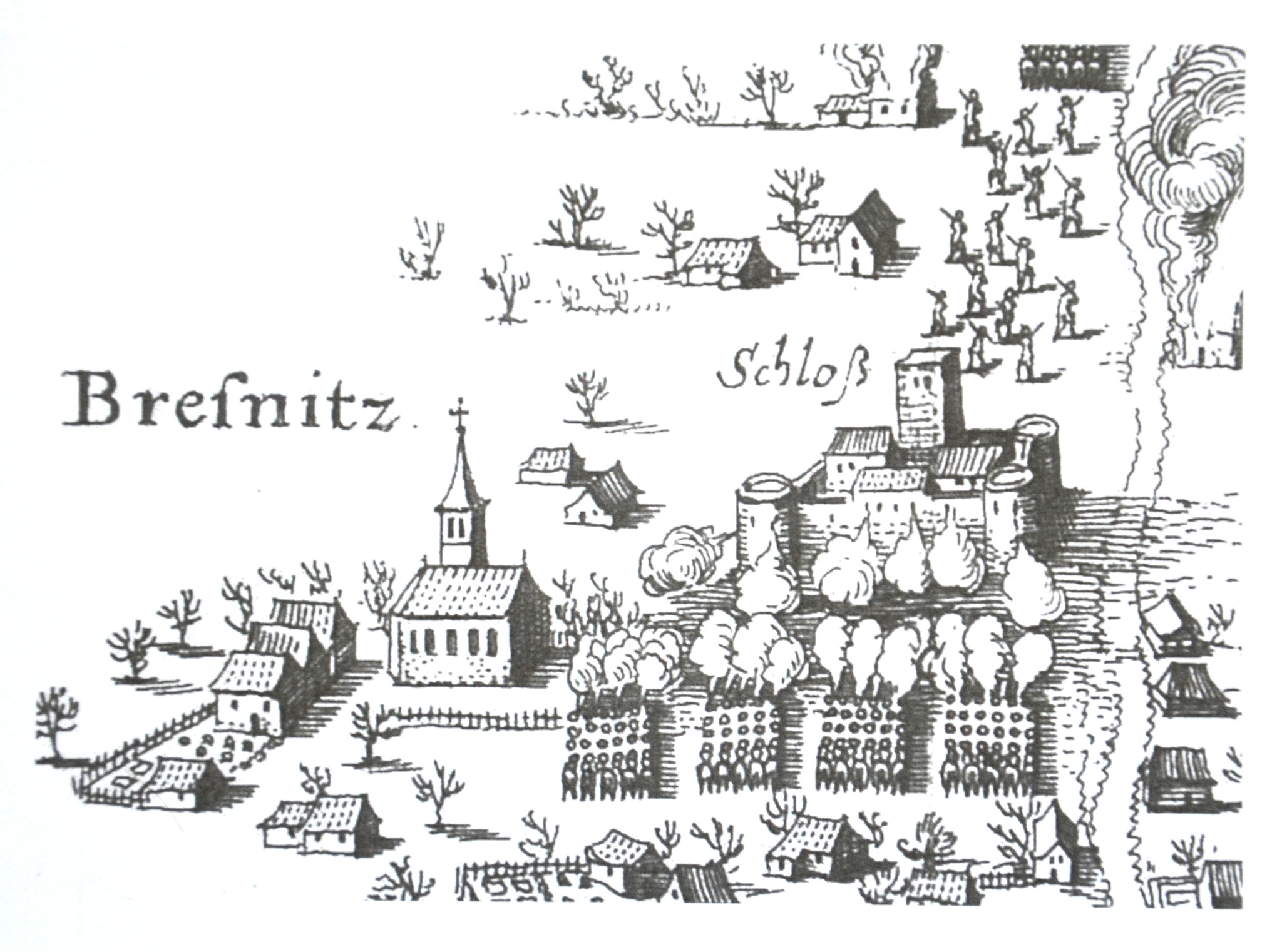 Mědirytina bitvy u Přísečnice, výřez dobývání tvrze